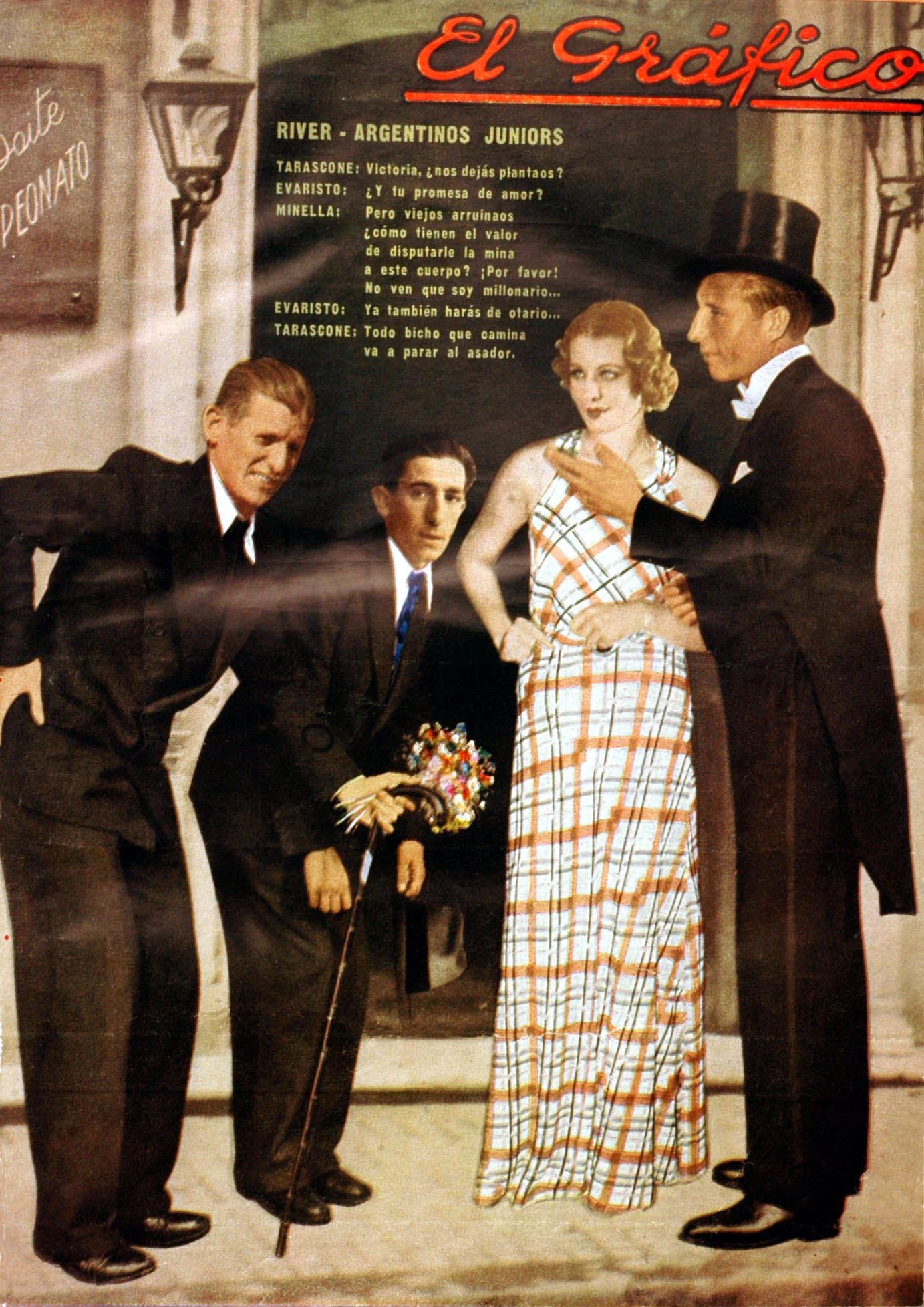 El Grafico del 16 de Mayo de 1936. Edicion 879